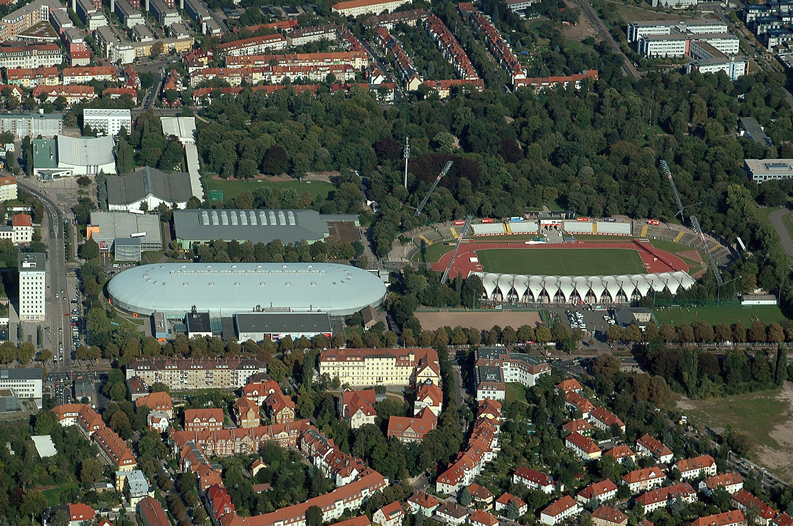 Luftbild von der Gunda-Niemann-Stirnemann-Halle (links) und vom Steigerwaldstadion (rechts) in der Arnstädter Straße in Erfurt